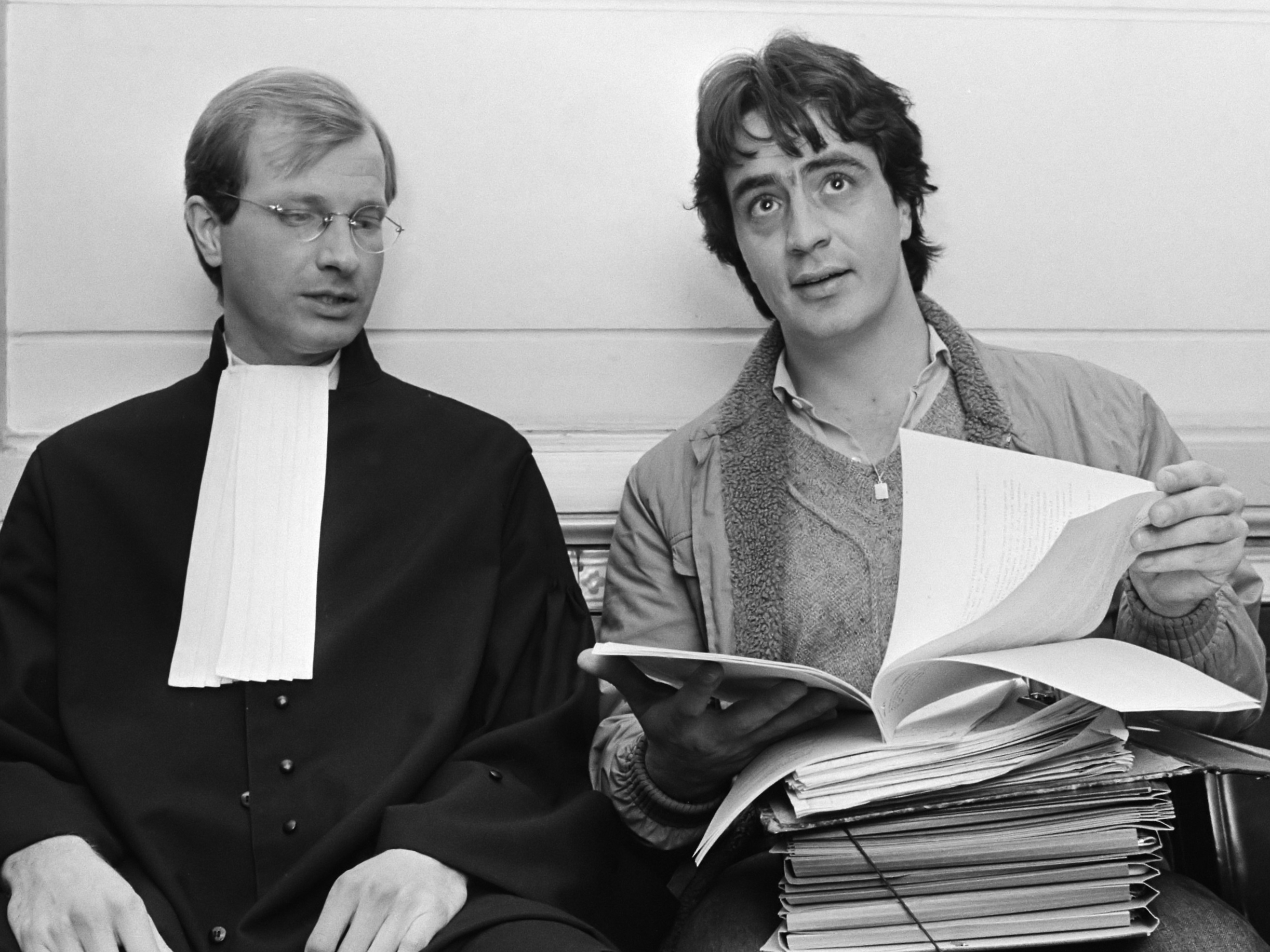 Kort geding Geïllustreerde Pers tegen onroerend goed-handelaar Ronald van der Putte (Haarlem). Mr. H.J.M. Storms en Pieter Storms (r.) 22 januari 1982